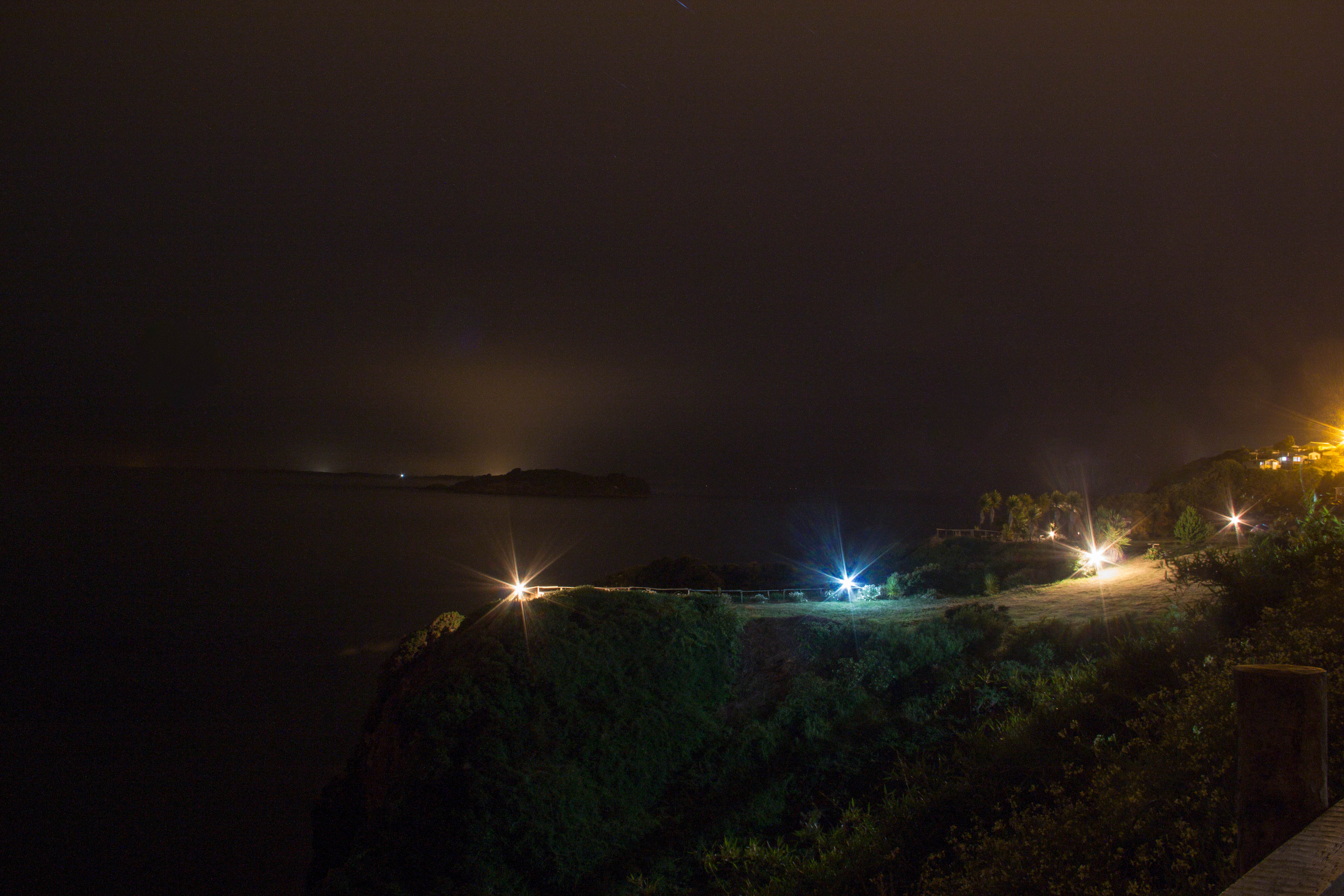 Chiloe - X Region